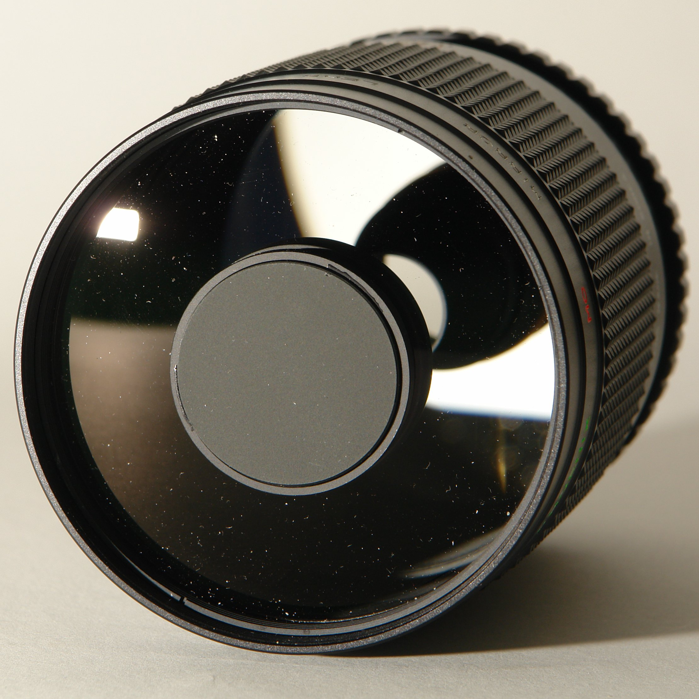 Phoenix 500mm f/8 mirror lens